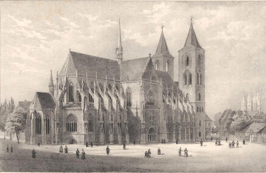 Dom zu Halberstadt, Lithographie : 20 x 12 cm, Heinrich Wilhelm Teichgräber